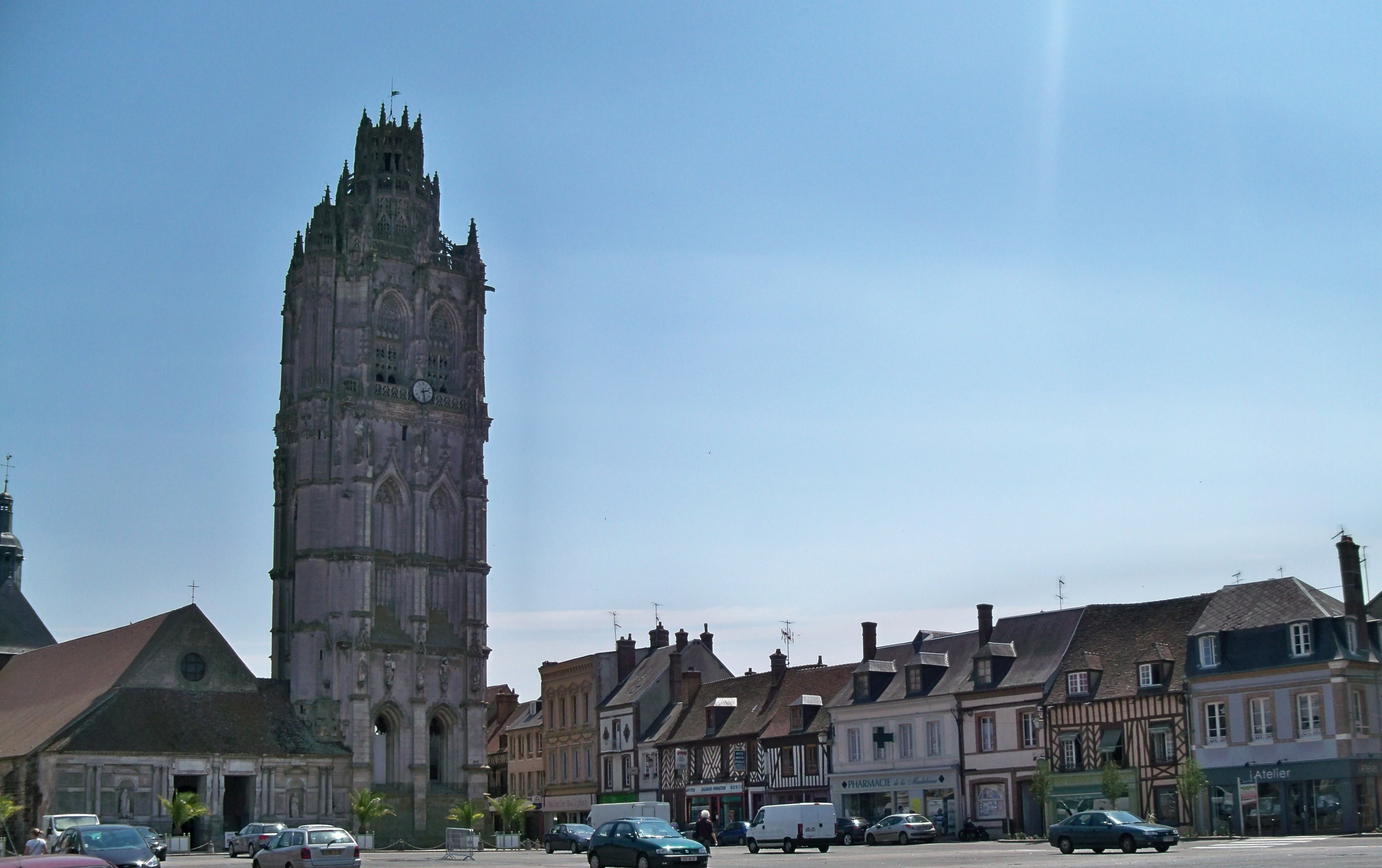 église de Verneuil sur Avre (27) (classé, 1943)